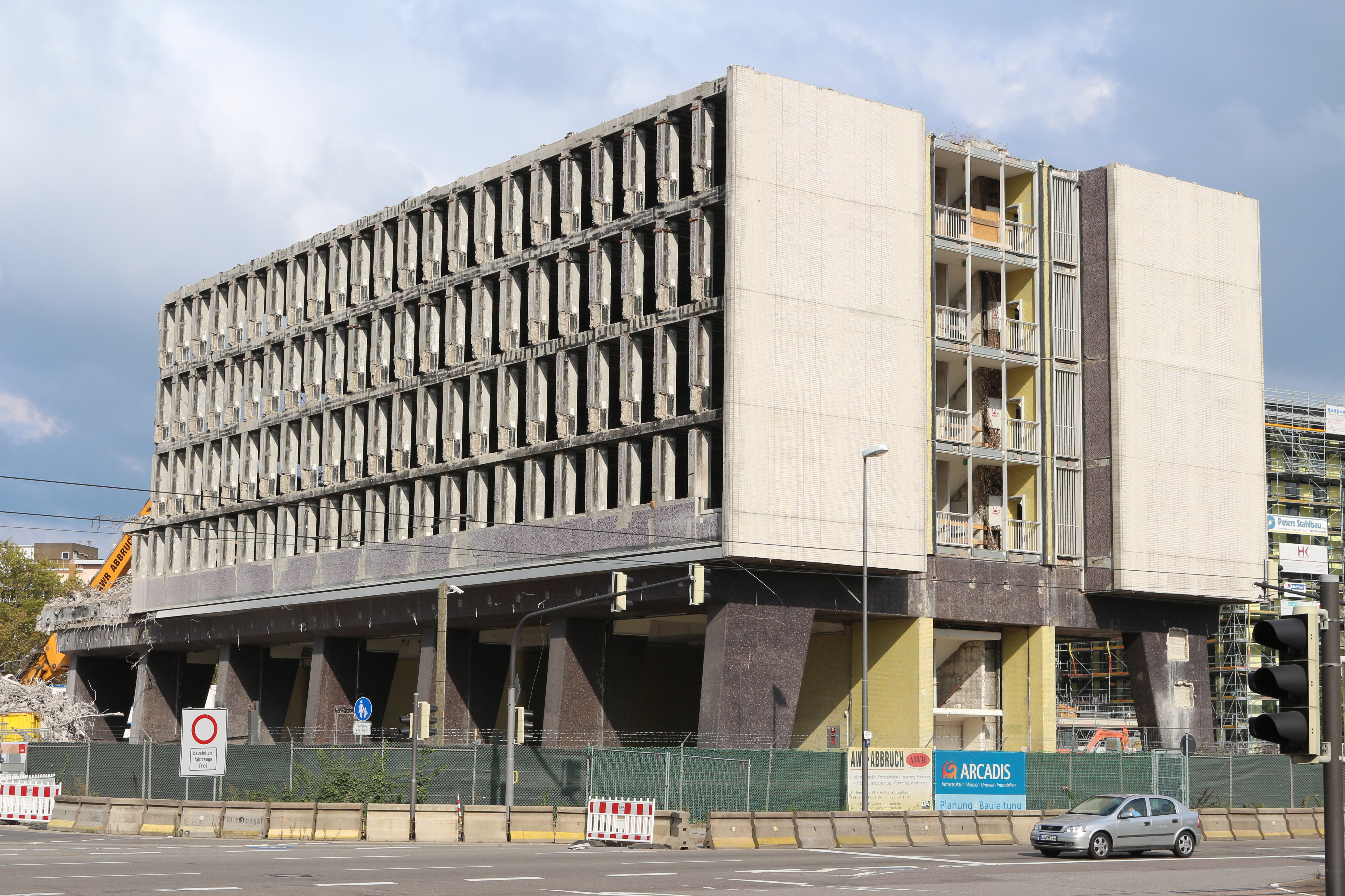 Abrissphase